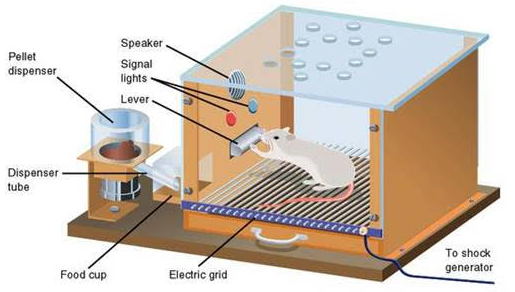 Skinera kastes piemērs